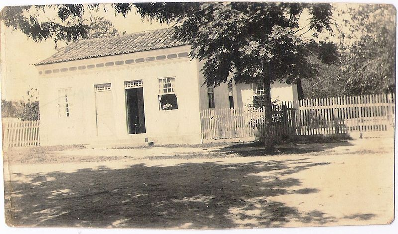 Residência da Família Ricardo Witthinrich e Maria de Sousa Uliano Witthinrich (Cotinha). Rua Nereu Ramos, Braço do Norte/SC. Foto cedida por Estela Maria Kindermann Bianchini. Acervo da família. A família habitou esta casa até as bodas de ouro de Ricardo e Cotinha. Foi demolida em 11 de fevereiro de 2003.